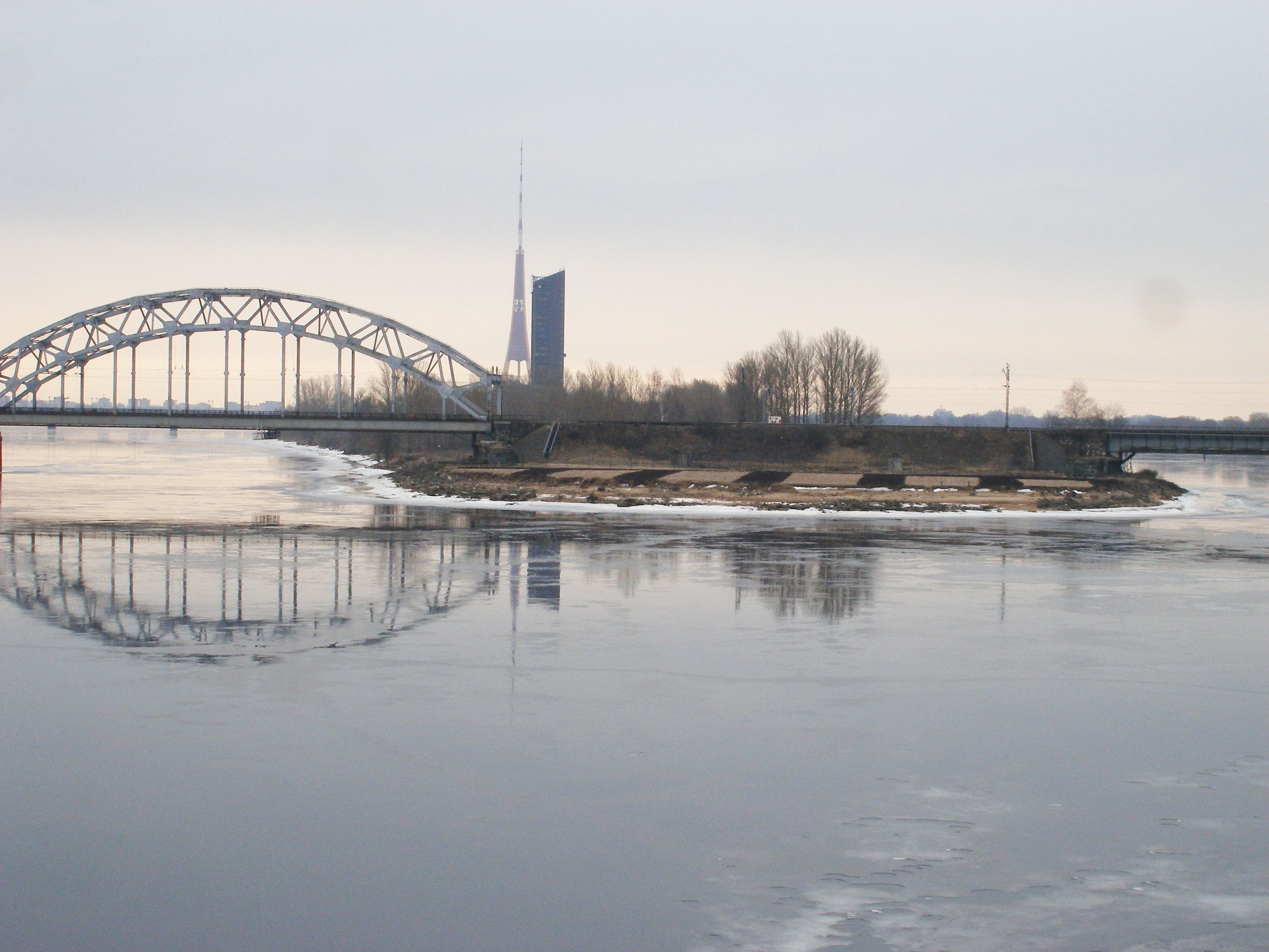 Zaķusalas ziemeļu gals ar mākslīgi izveidotajām zīriņu ligzdošanas vietām.